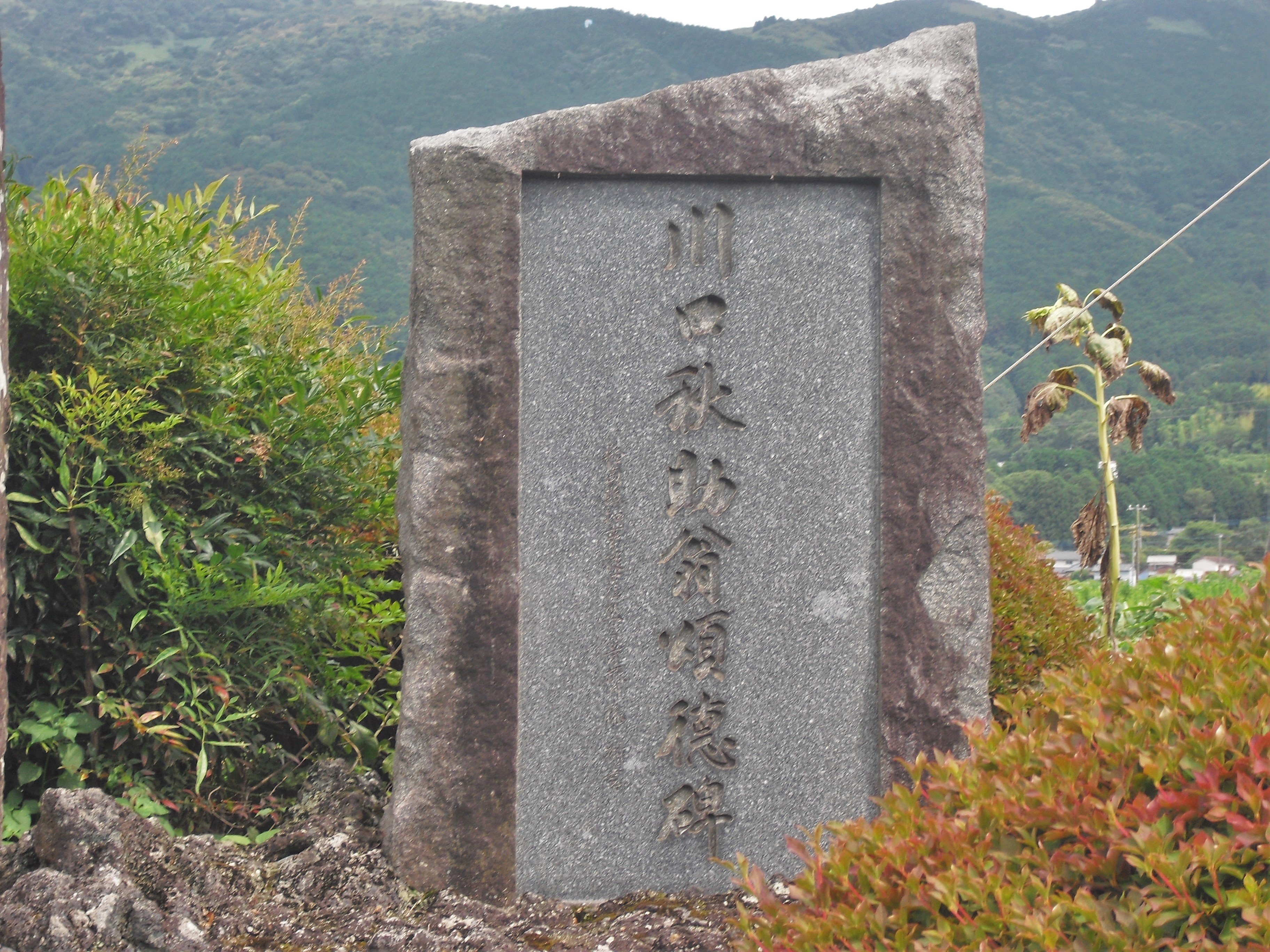 丹那酪農業の父、川口秋助翁の記念碑。2016年7月19日撮影